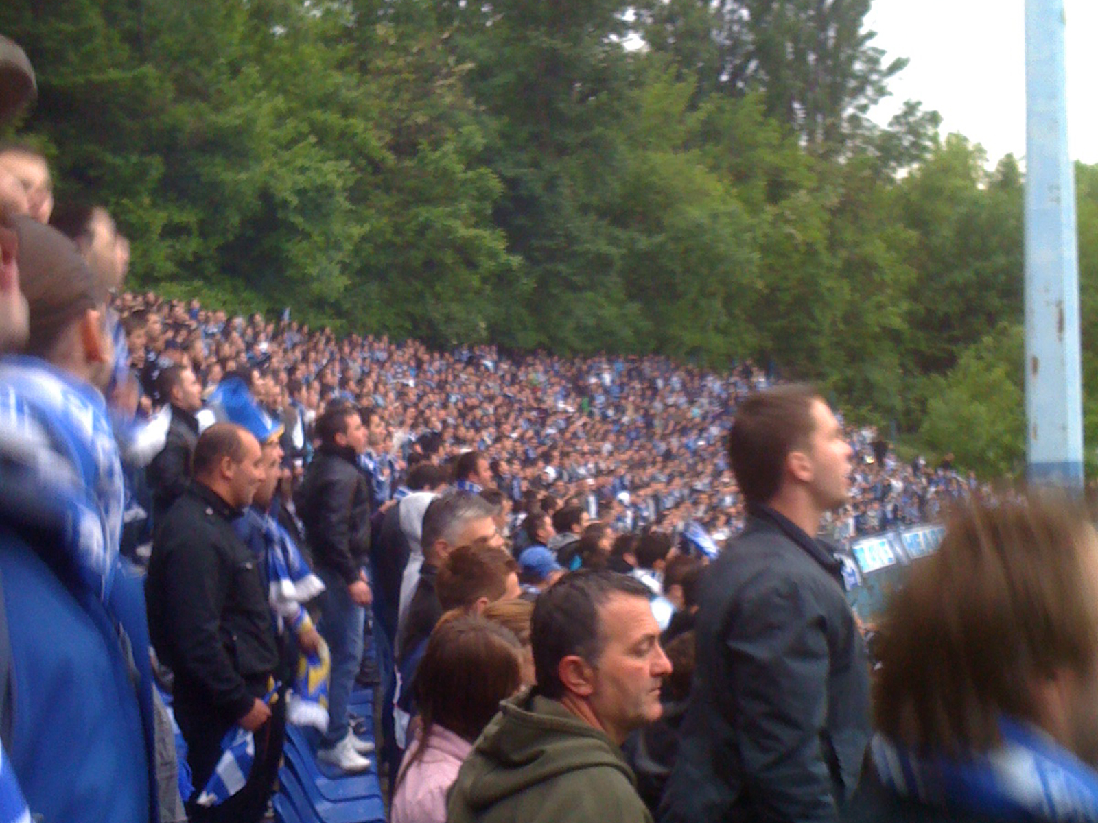 FK ?eljezni?ar vs. FK Borac @ Grbavica Stadium, Sarajevo